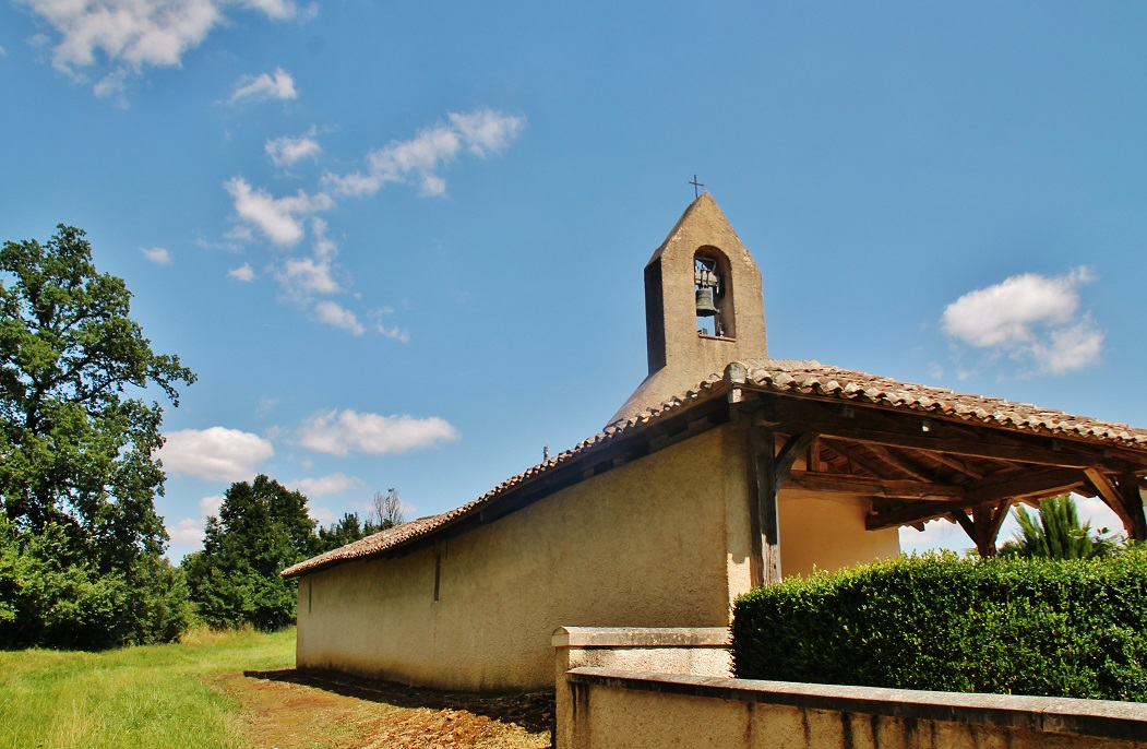 église St Remy